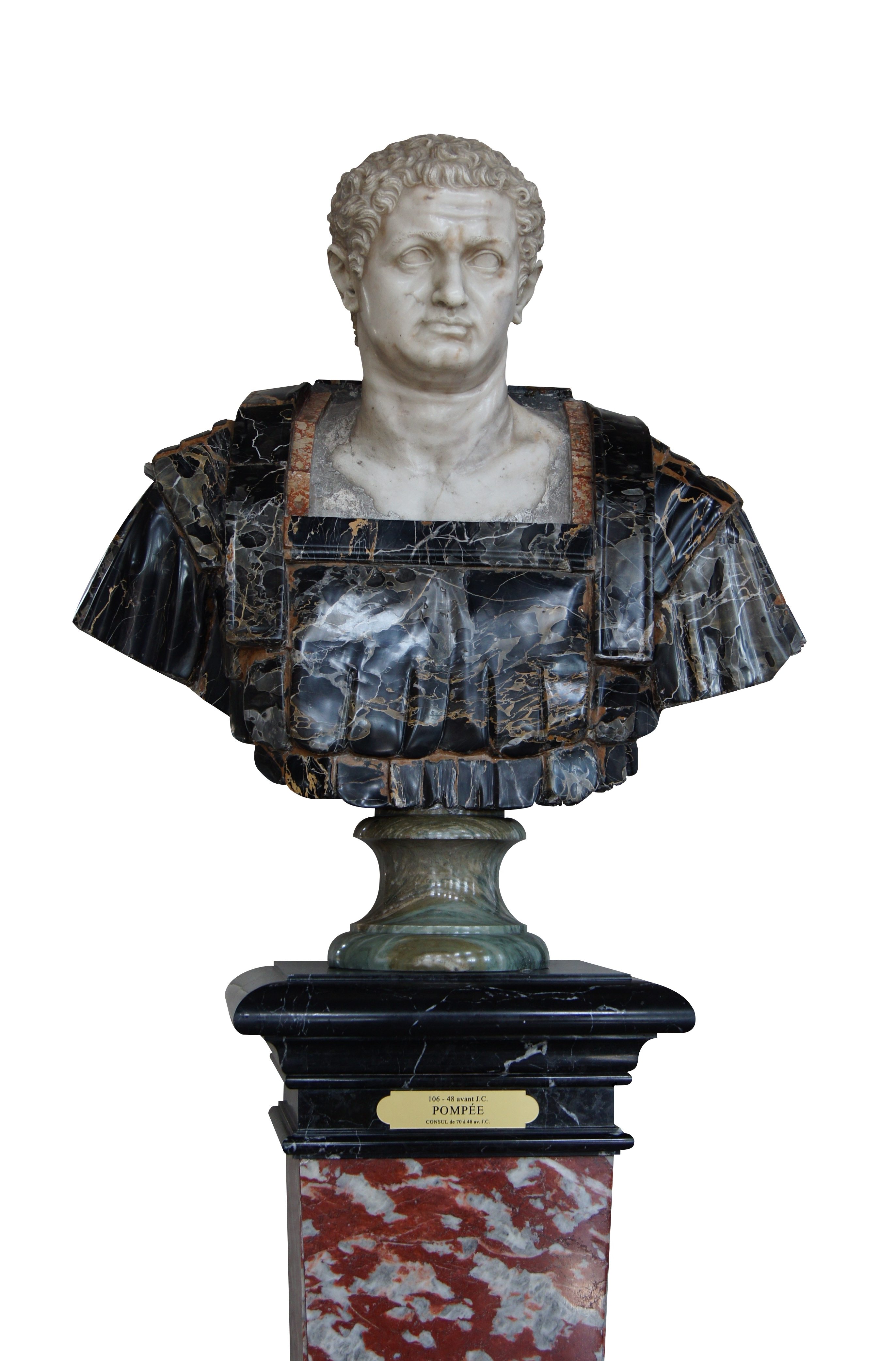 Gnaeus Pompeus Magnus, Marble bust, XVIIth century, Florence, Italy. On display in Chateau de Vaux-le-Vicomte, France